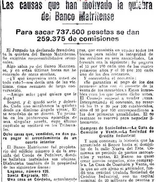 Articolo di giornale che spiega i motivi del fallimento fraudolento del Banco Matritense di Madrid